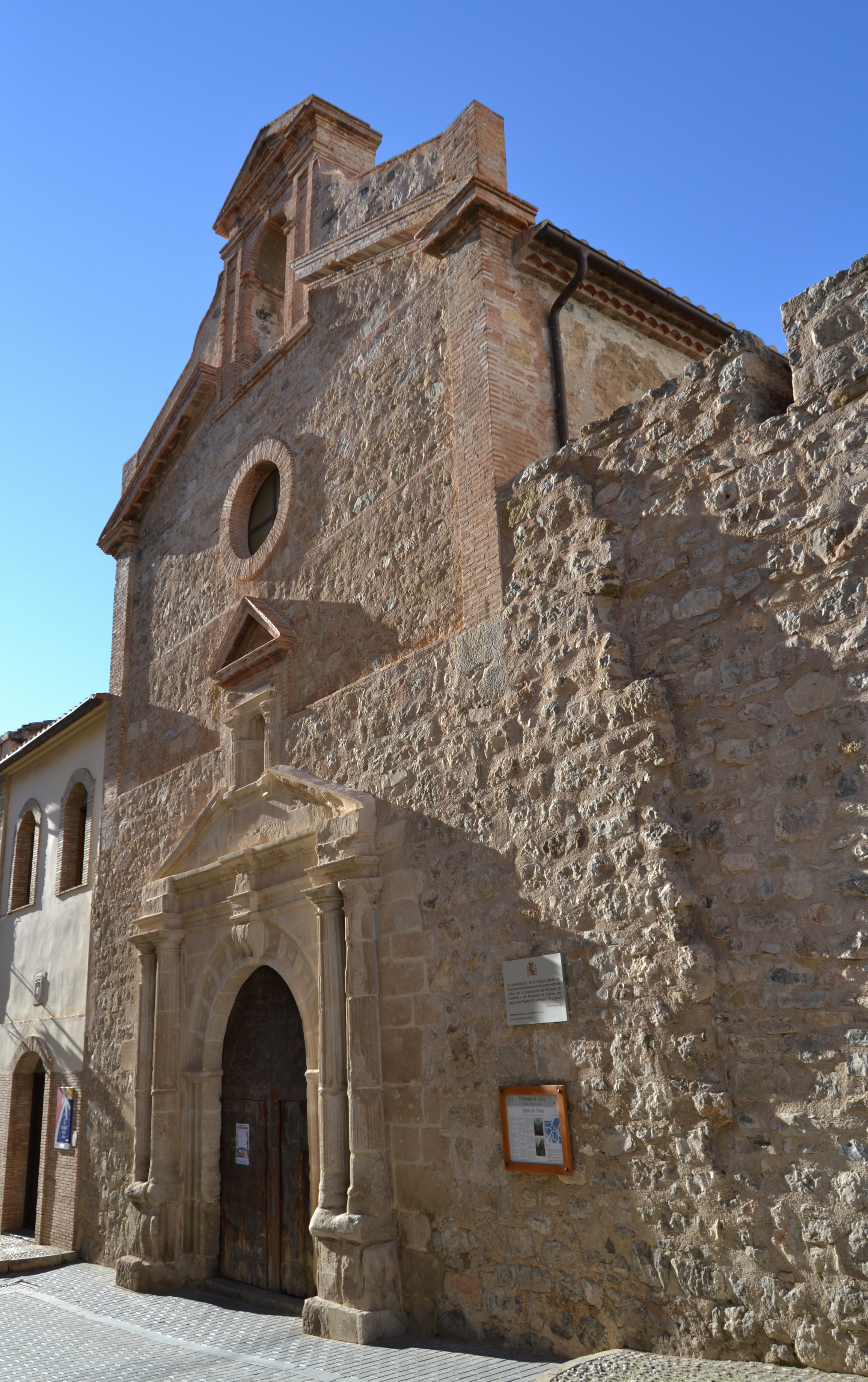 Església del convent dels Agustins del Socors, Xèrica.